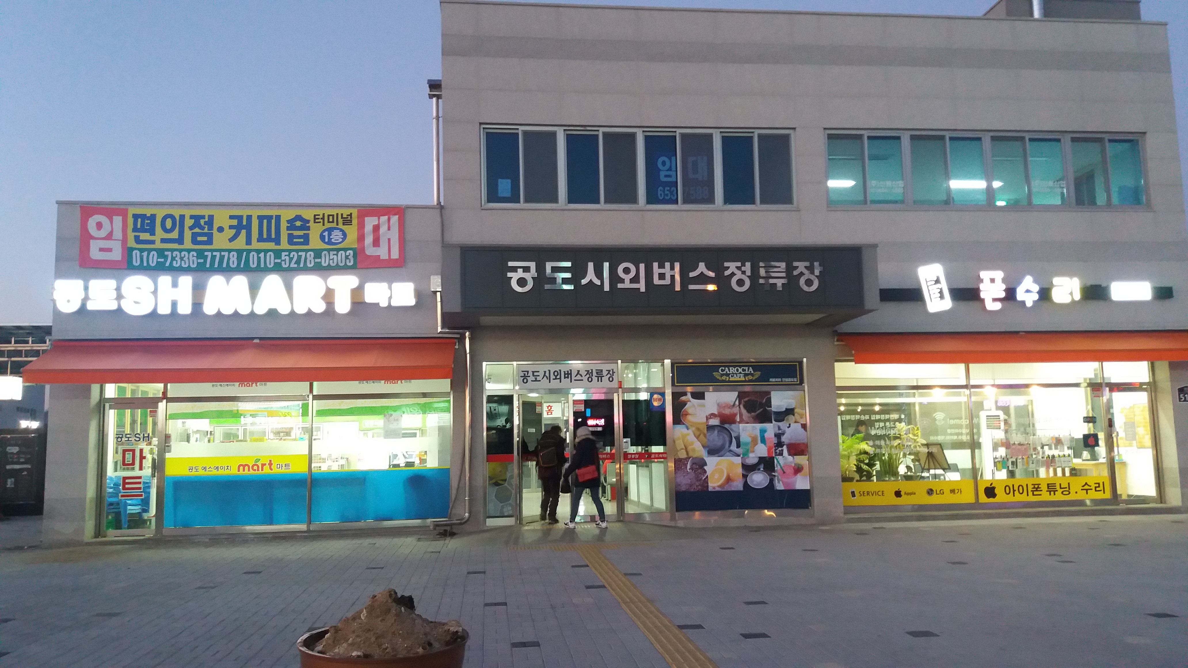 공도시외버스터미널